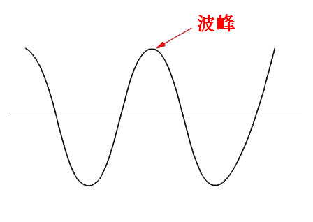 波峰